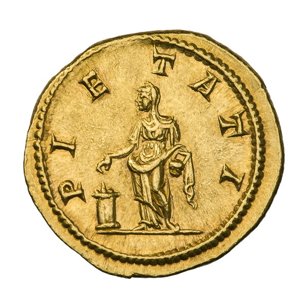 Ауреус. Юлия Домна. Ок. 211—217 гг. (реверс). Надпись PIETATI. Пиета (персонификация долга) стоит, влево; в правой руке держит патеру над алтарем. Точечный ободок.